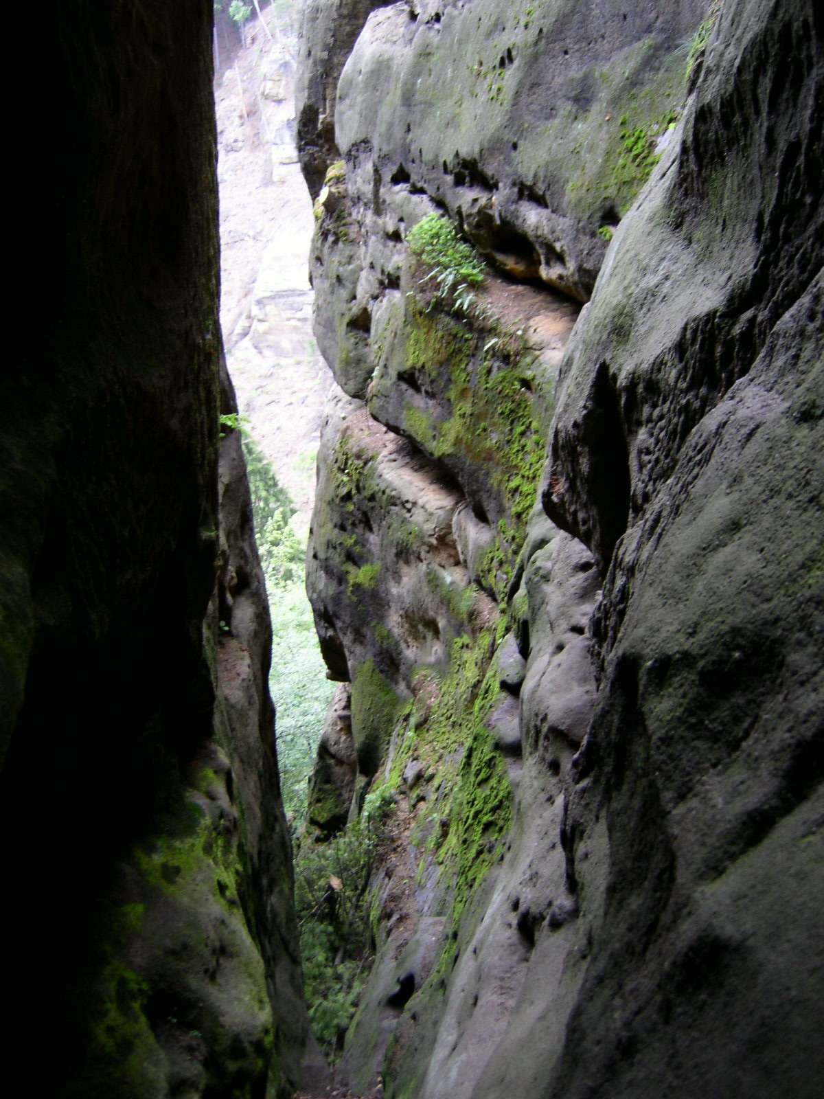 Felsenburg Falkenstein nahe Jetrichovice